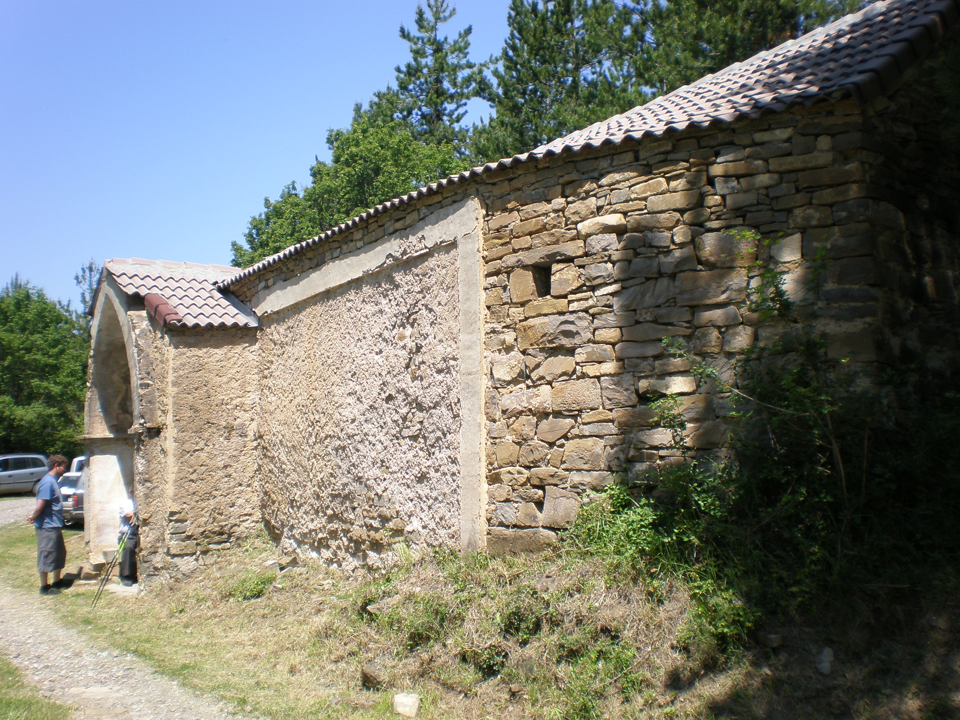 Imagen de la Ermita de San Juan del antiguo poblado de Izuel- Villanúa